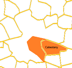 Mapa del Cantó de Perpinyà 3 elaborat a partir d'un mapa de lliure disposició